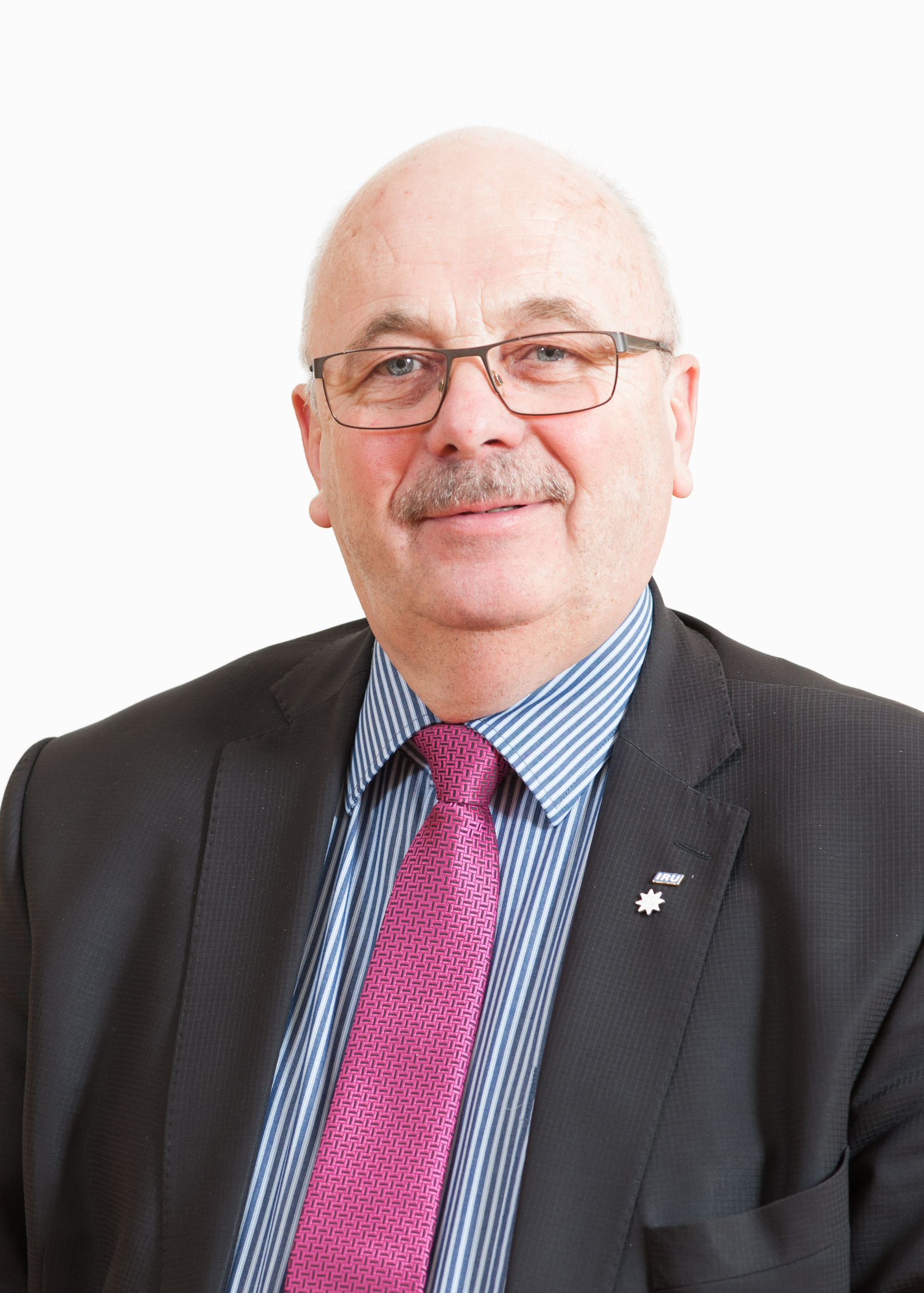 Einar Vallbaum